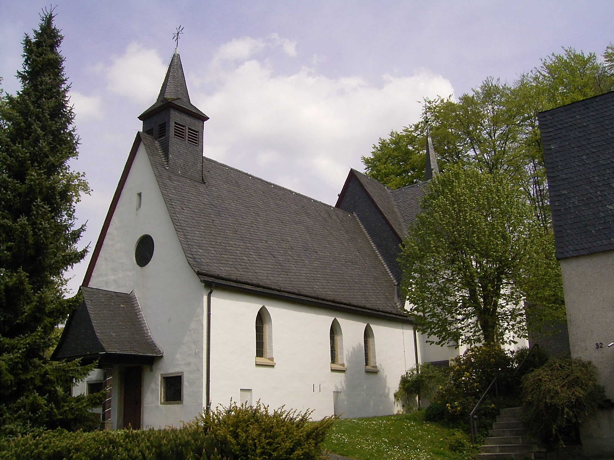 Sankt Johann Baptist in Bergisch Gladbach-Herrenstrunden